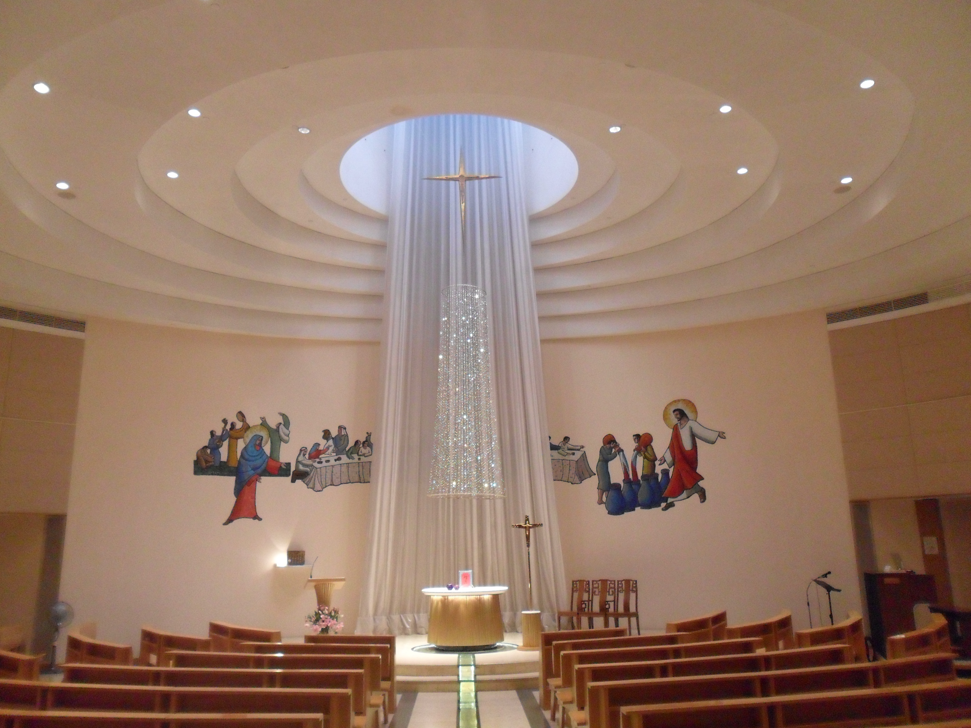 中文（香港）: 聖母聖衣堂, 香港, 中國